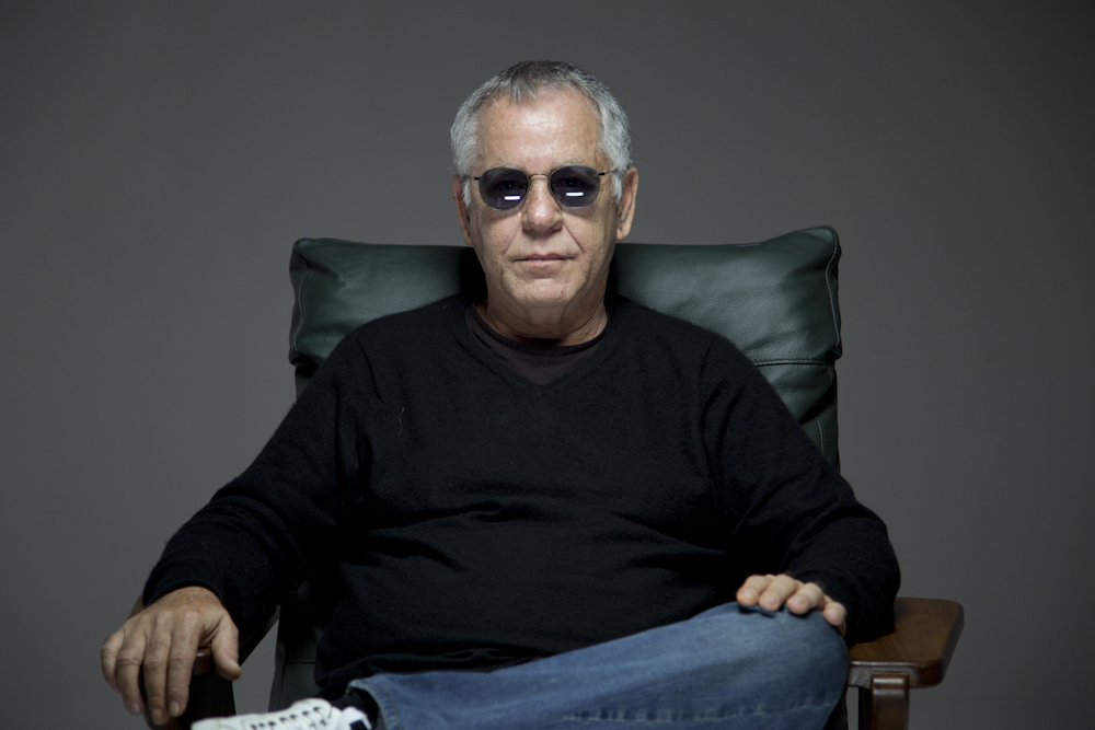 Foto tirada em 15/06/2010 pelo Garapa - Coletivo Multimídia ( Nelson Motta em entrevista ao projeto Produção Cultural no Brasil: Nelson Motta é produtor musical.